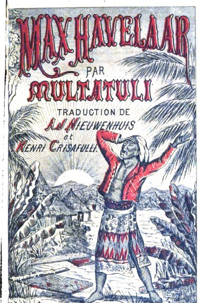 Traduction en français du roman de Multatuli Max Havelaar, Dentu, Paris, 1876 Illustration de couverture.